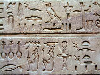 Hiéroglyphes, temple de Komombo.